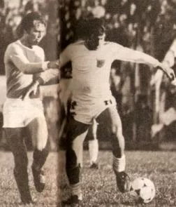 Partido amistoso entre la Selección Argentina y la Selección de la Liga del Sur, en el Estadio Roberto Natalio Carminatti, antes del mundial de 1978.